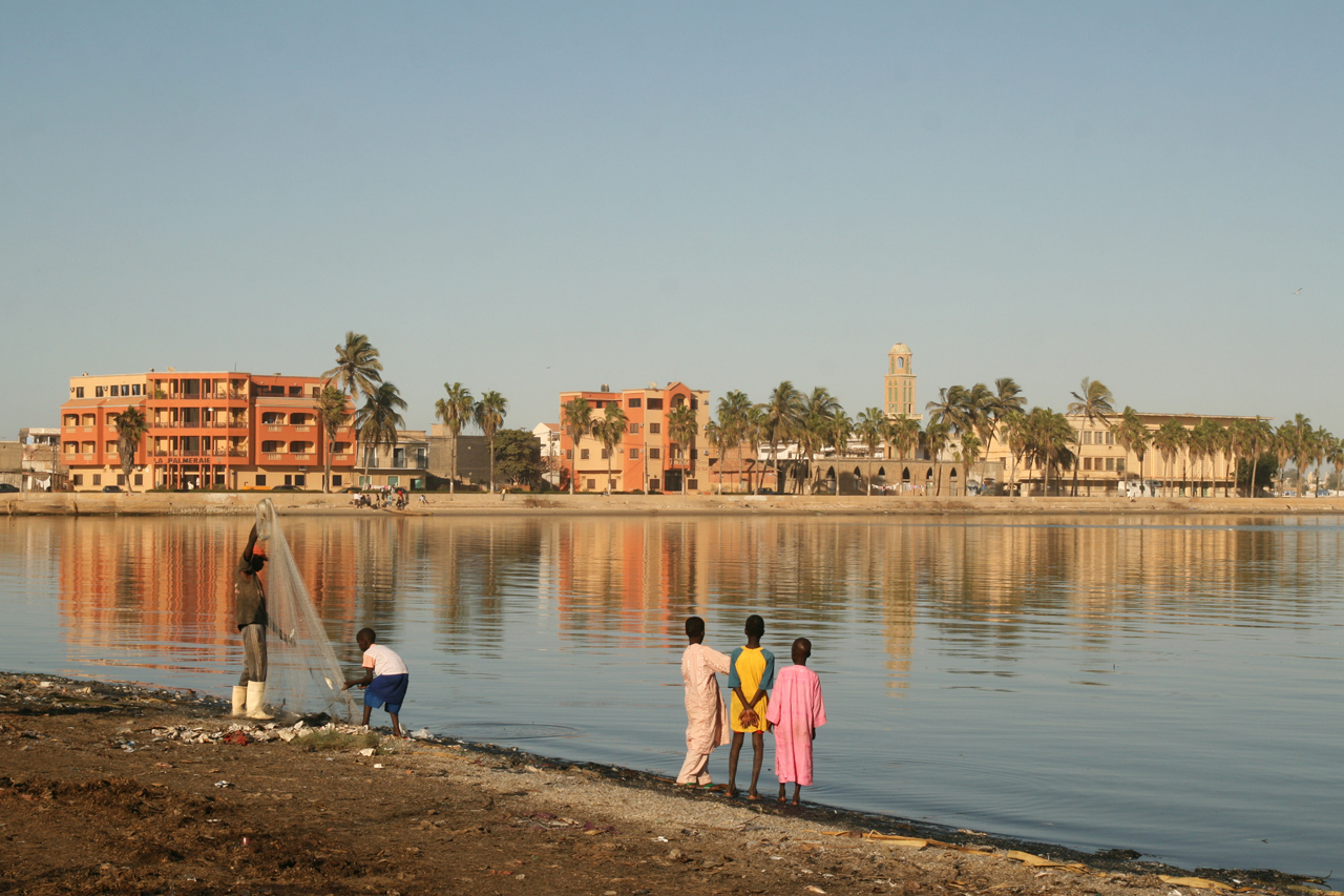 Ile sud à Saint-Louis du Sénégal